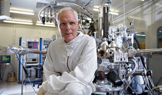 פרופסור לפיזיקה מרדכי הייבלום